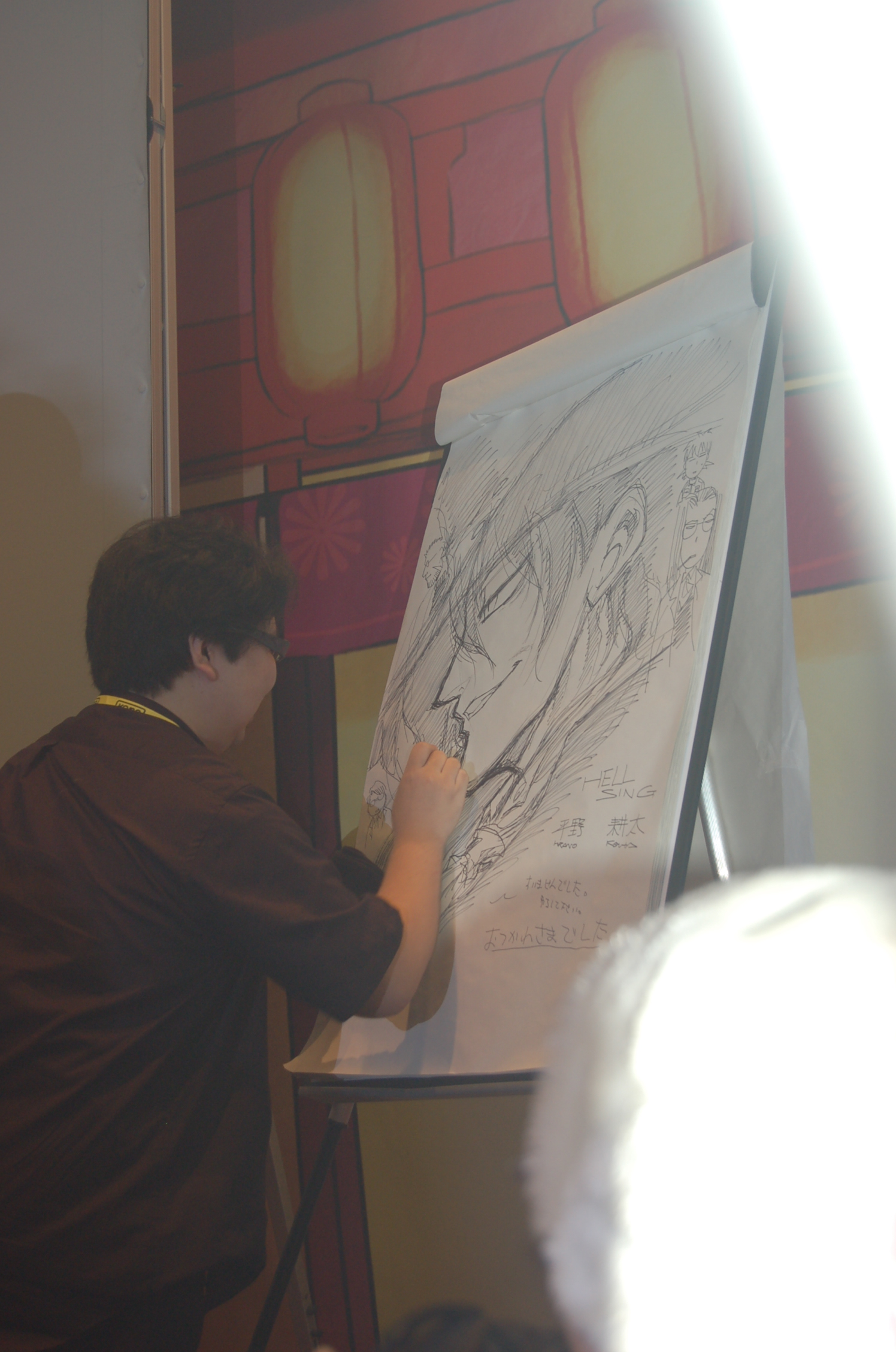 Kohta Hirano en train de dessiner lors de la Japan Expo 2008